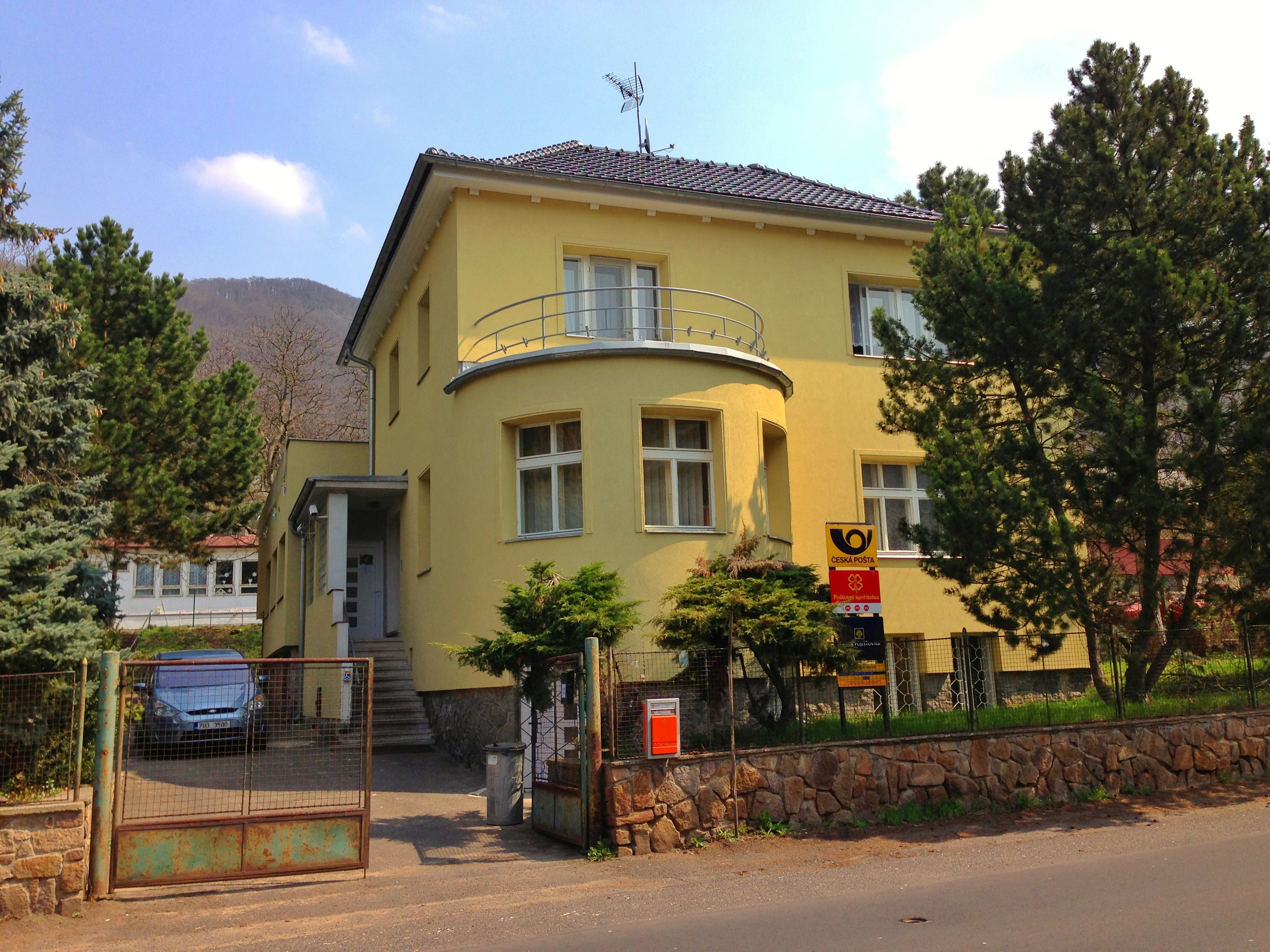 Budova České pošty v Sebuzínské ulici v Brné nad Labem.